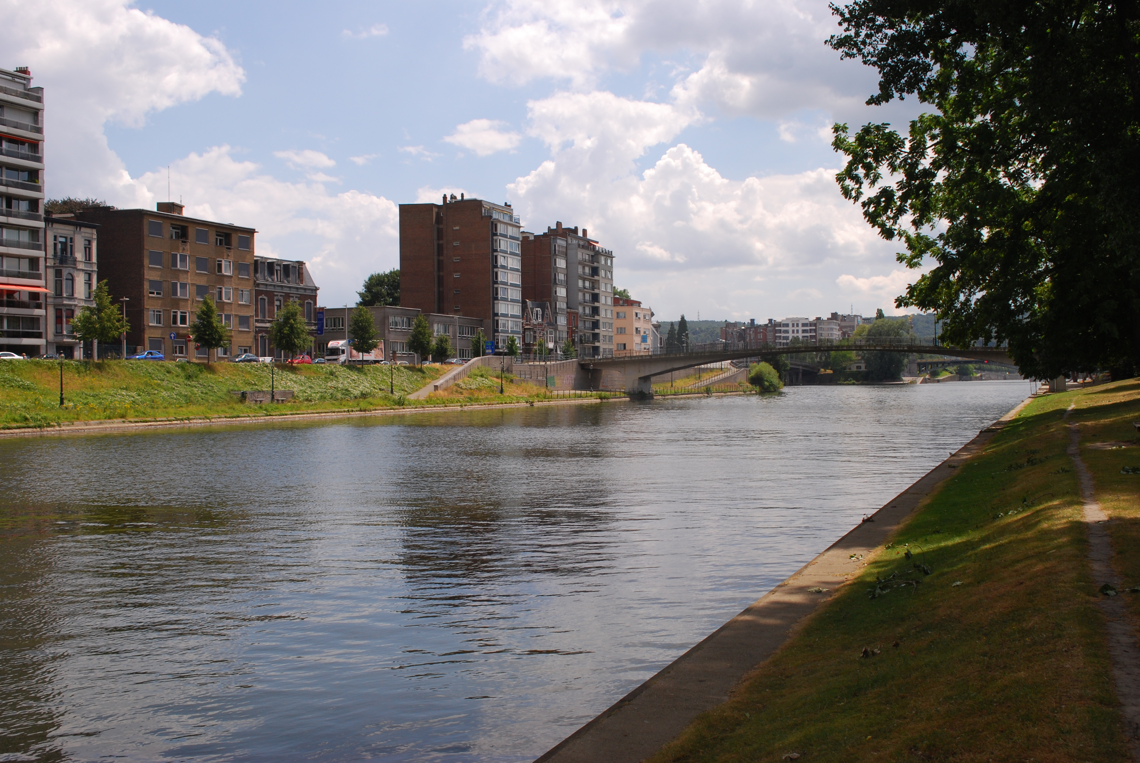 La Passerelle Mativa (ou Pont Hennebique) sur la Dérivation de la Meuse à Liège.